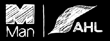 ロゴ